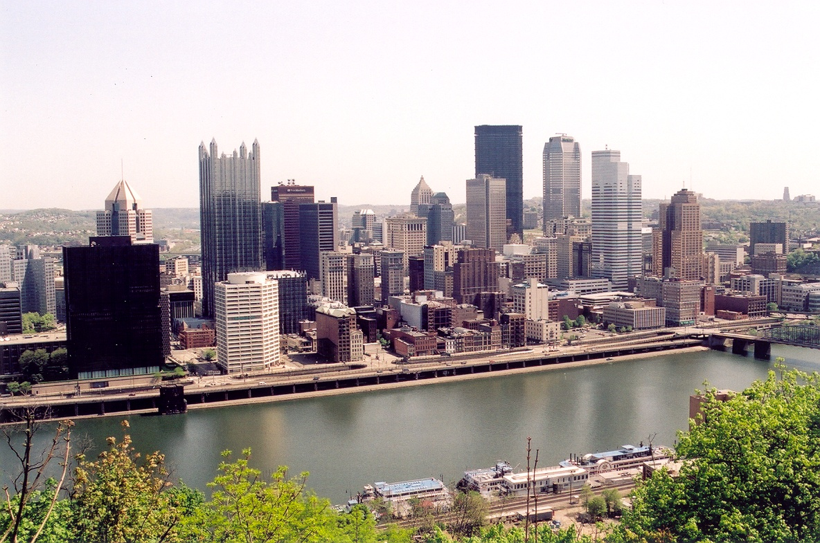 Pittsburgh, Pa., USA - voorjaar 2001